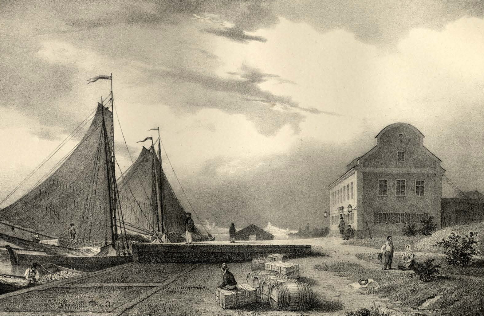 Stockholms pittoreska omgifningar tecknade efter naturen... Stora sjötullen